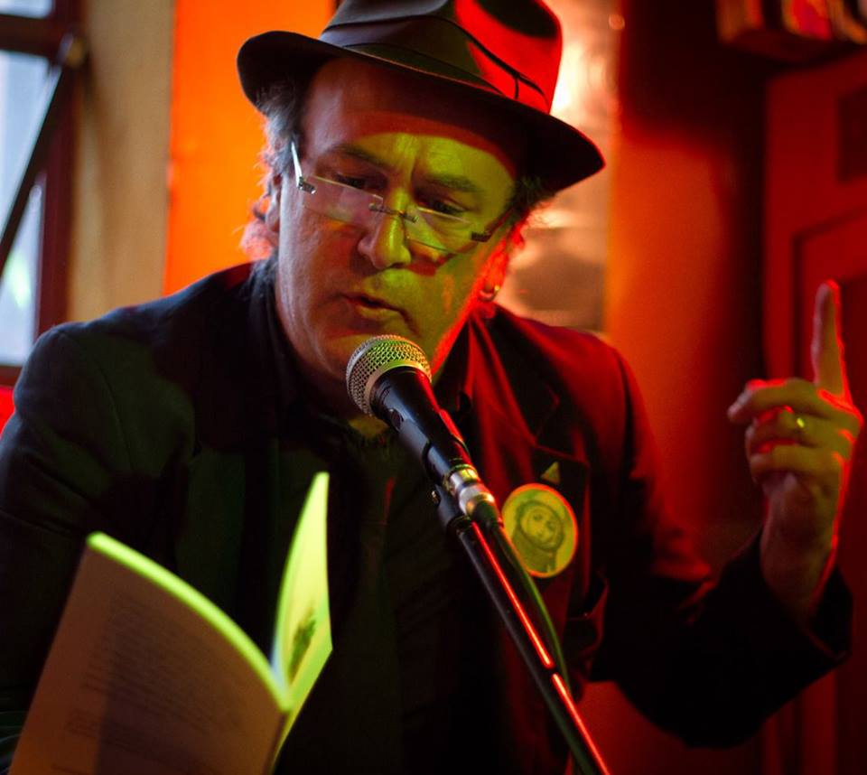 Francesco Forlani